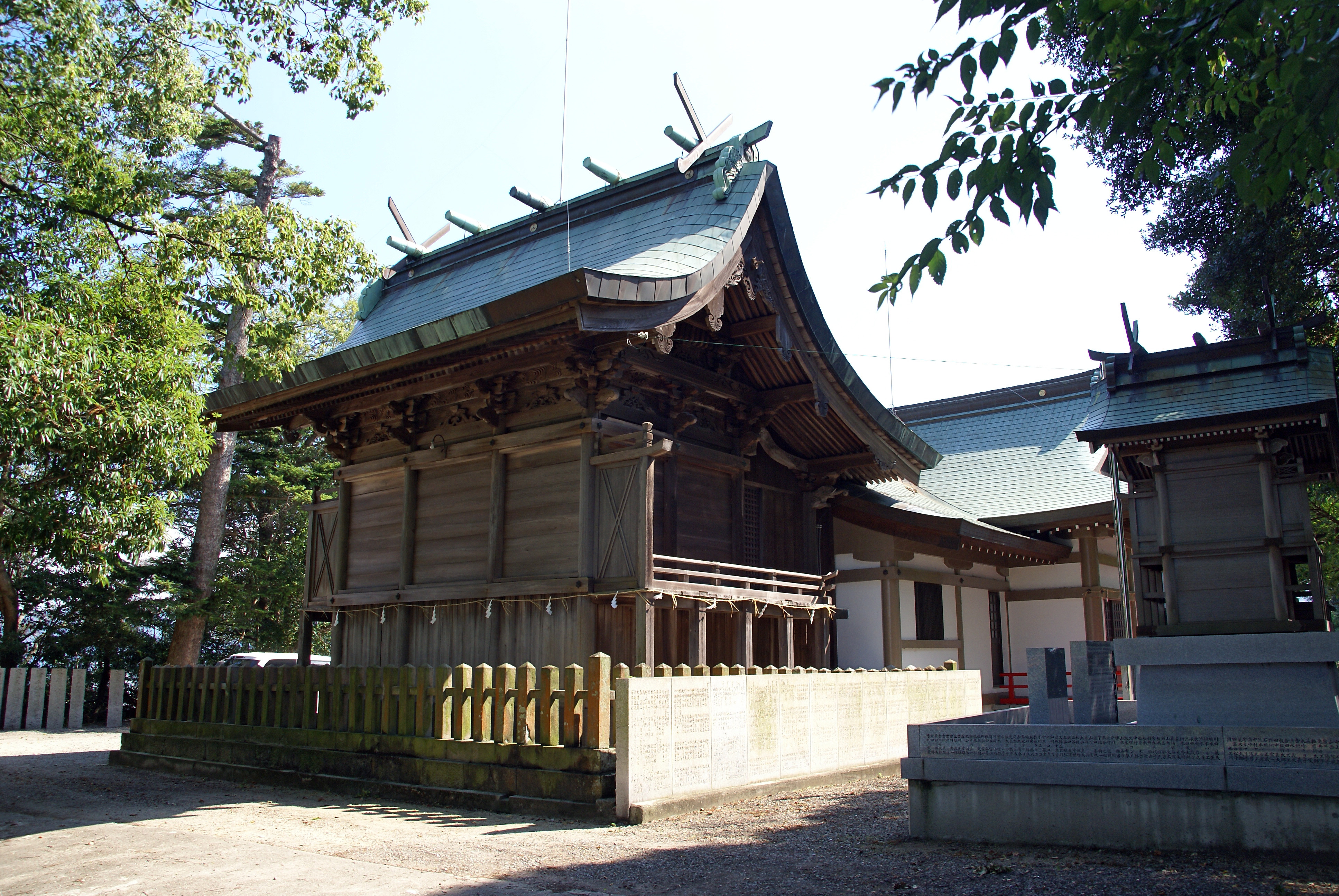 Honda-hachiman-jinja in Hiketa, Higashikagawa, Kagawa prefecture, Japan